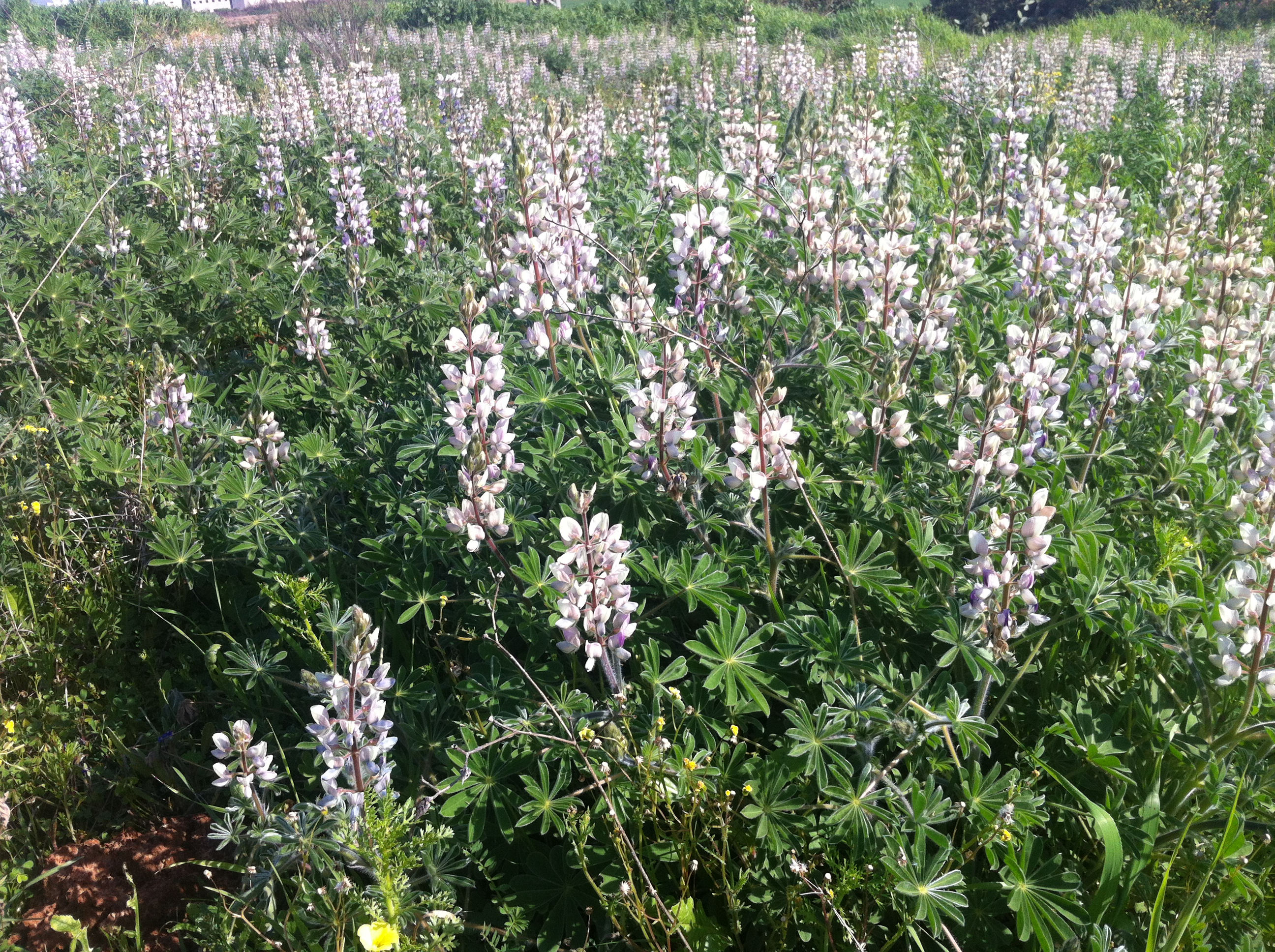 מרבד תורמוס ארצישראלי בהוד השרון, ישראל.